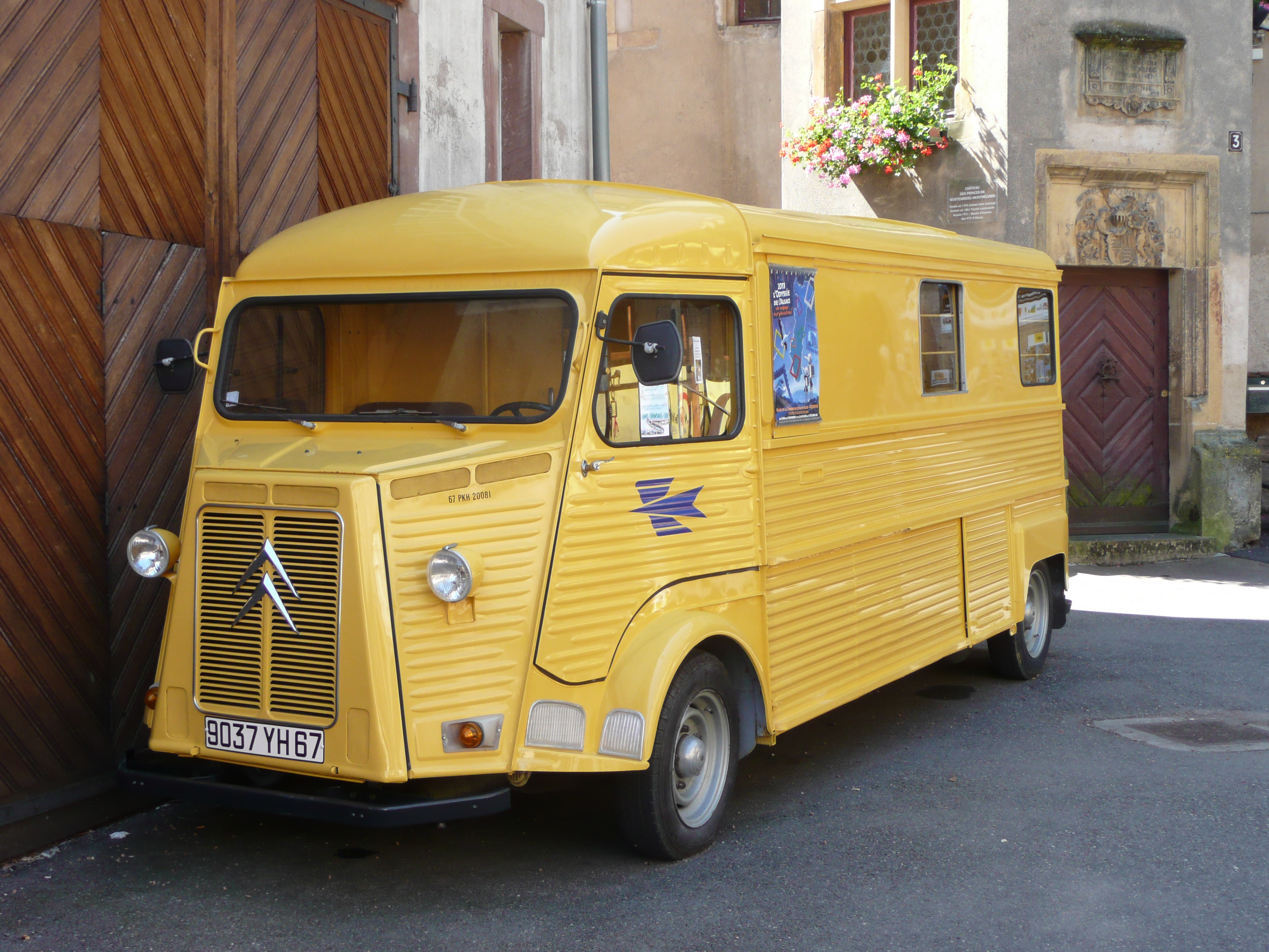 Type H Modèle Long Aménagé en bureau mobile de la Poste; exemplaire du Musée des PTT de Riquewhir